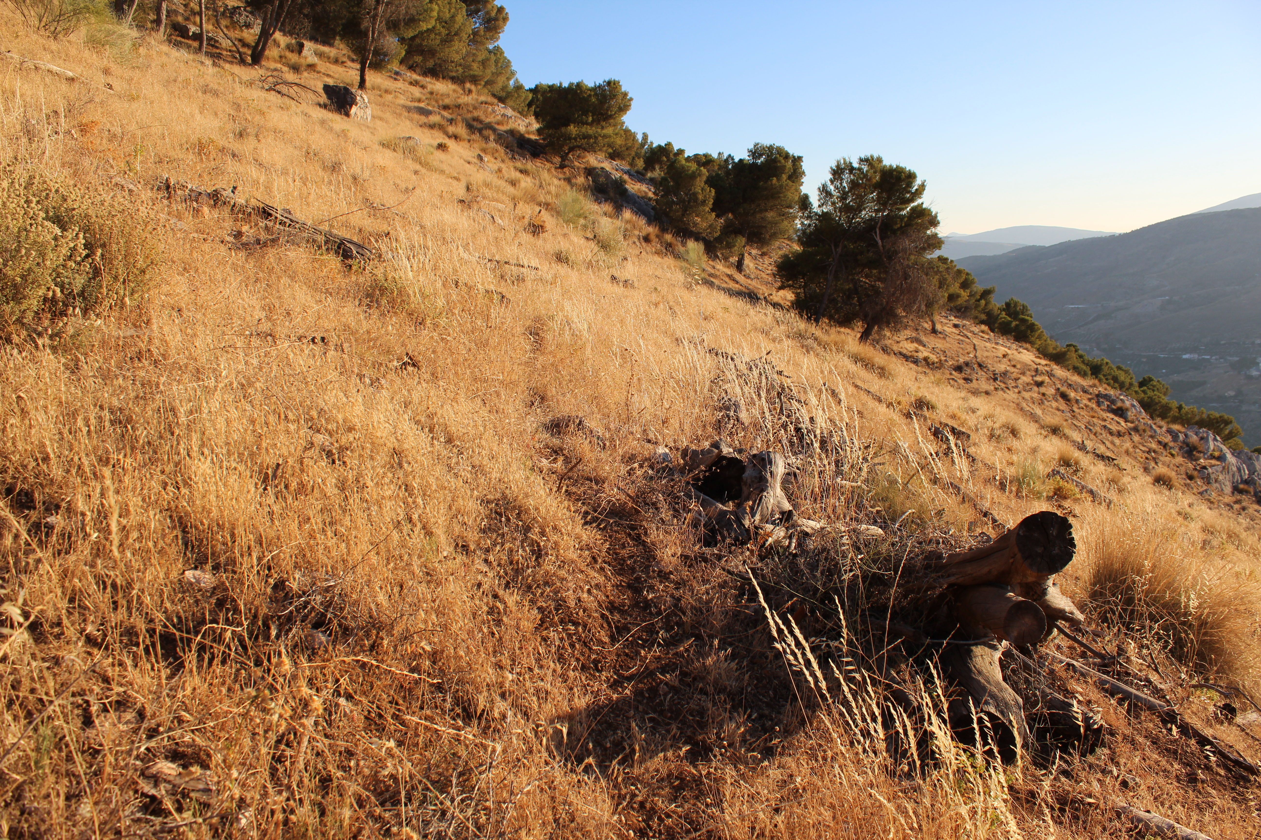 Aspecto de la vegetación y de los suelos de la Serrezuela de Pegalajar, en la zona que fue arrasada por el incendio de 2006.